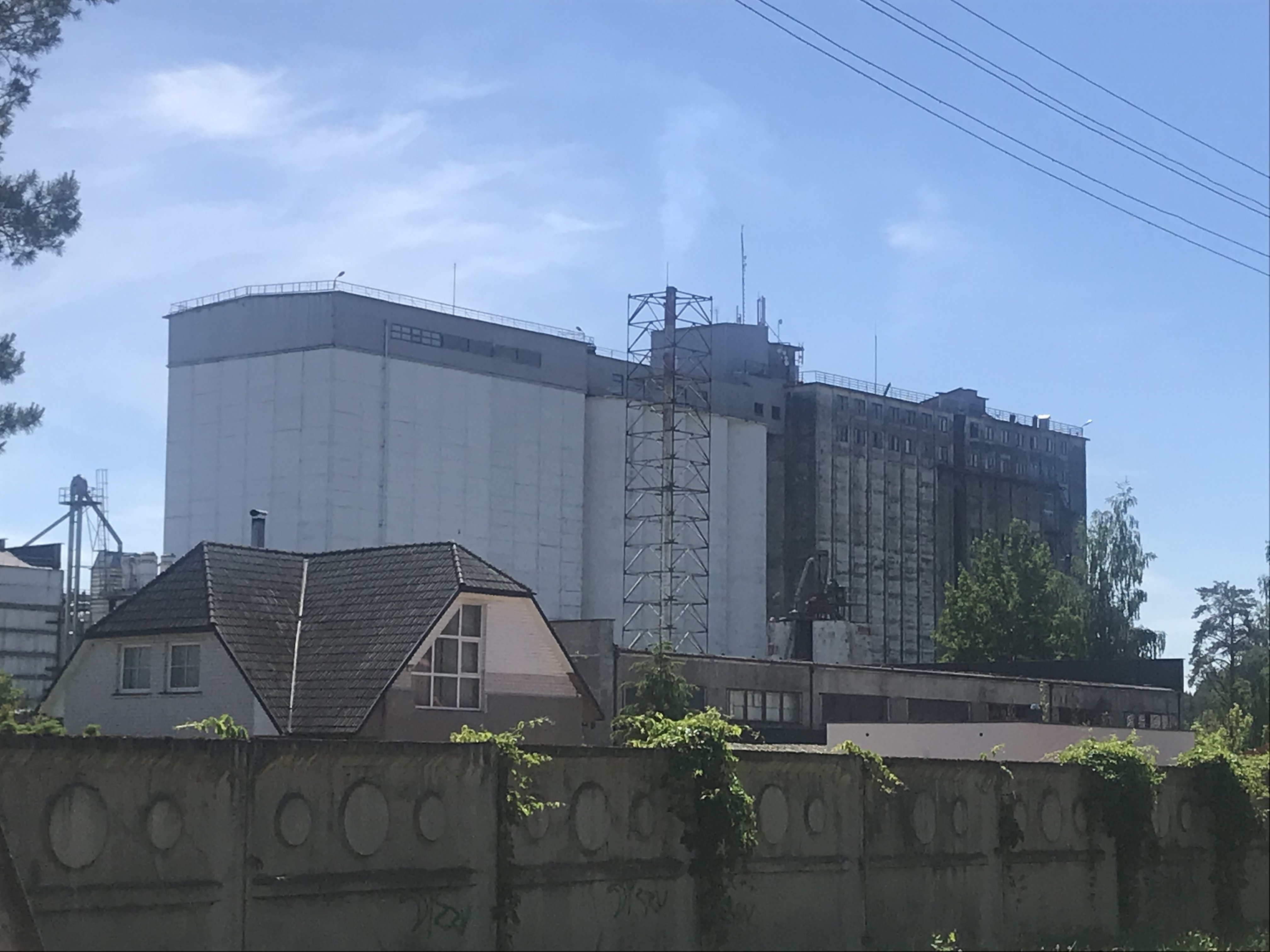 Gefotografeerd tijdens wandelproject Amsterdam-Moskou